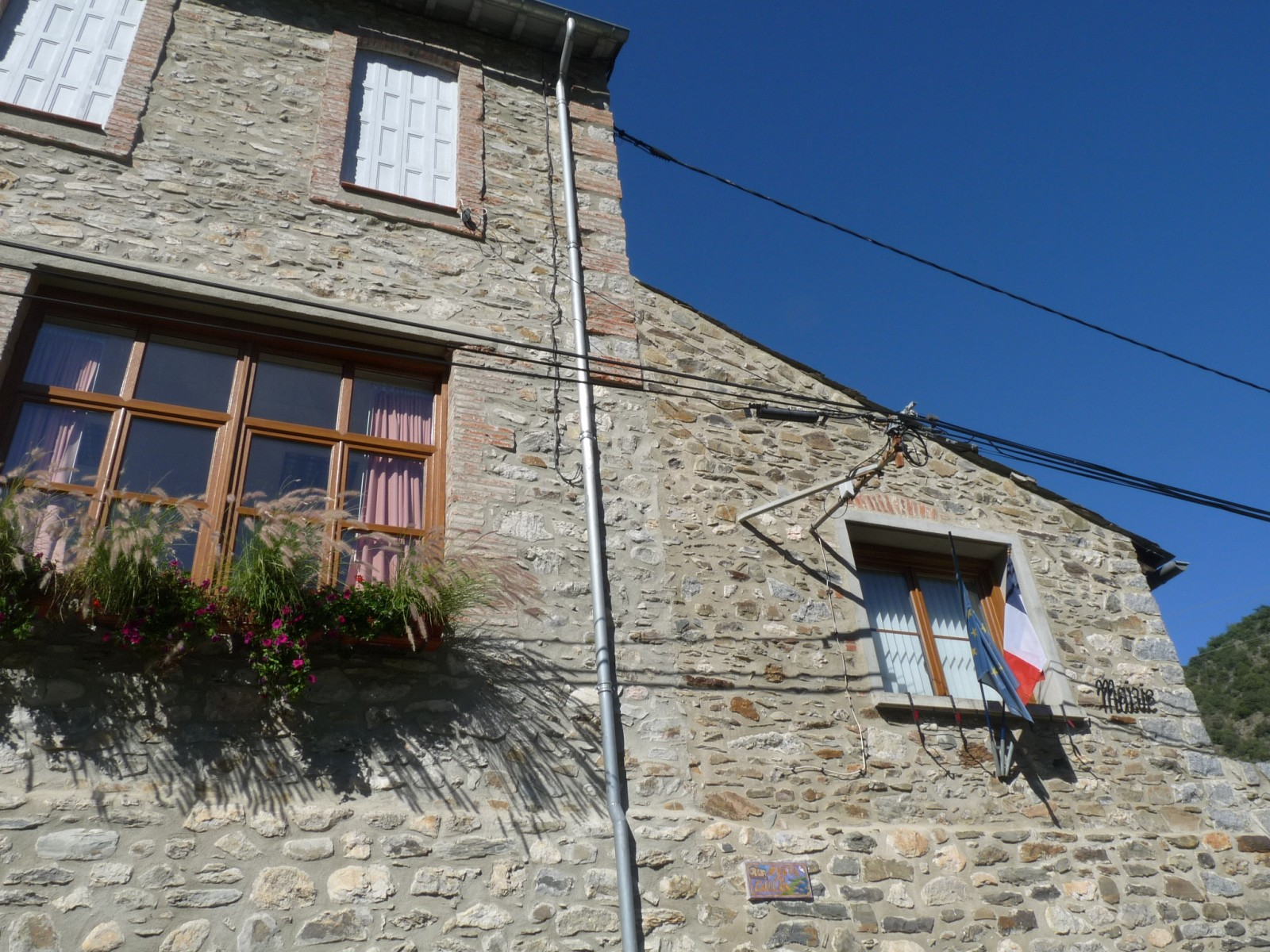 Mairie de Conat , Pyrénées-Orientales, France